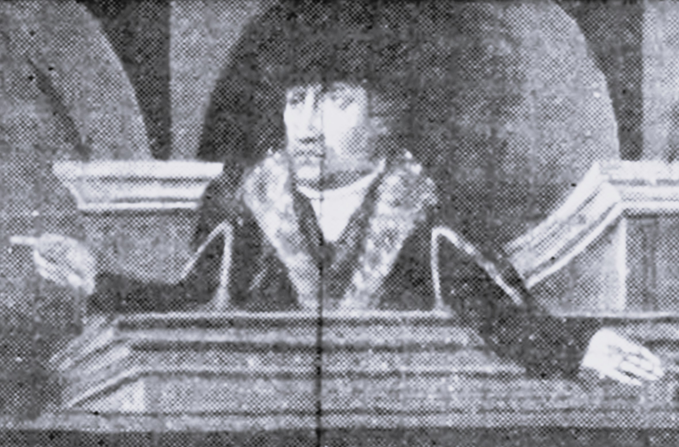 Johann Walhoff (1495-1543), deutscher Reformator. Ausschnitt seines Epitaphs in der Lübecker Marienkirche, 1942 verbrannt.